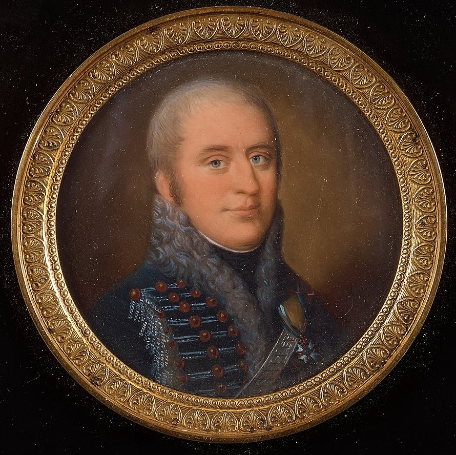 Porträtt av Jacob Otto Cronstedt (1766-1828) iklädd uniform för en major vid Livregementets husarkår. På bröstet syns Svärdsordens riddartecken. Målning av Carl Viertel från ca 1805. av Viertel